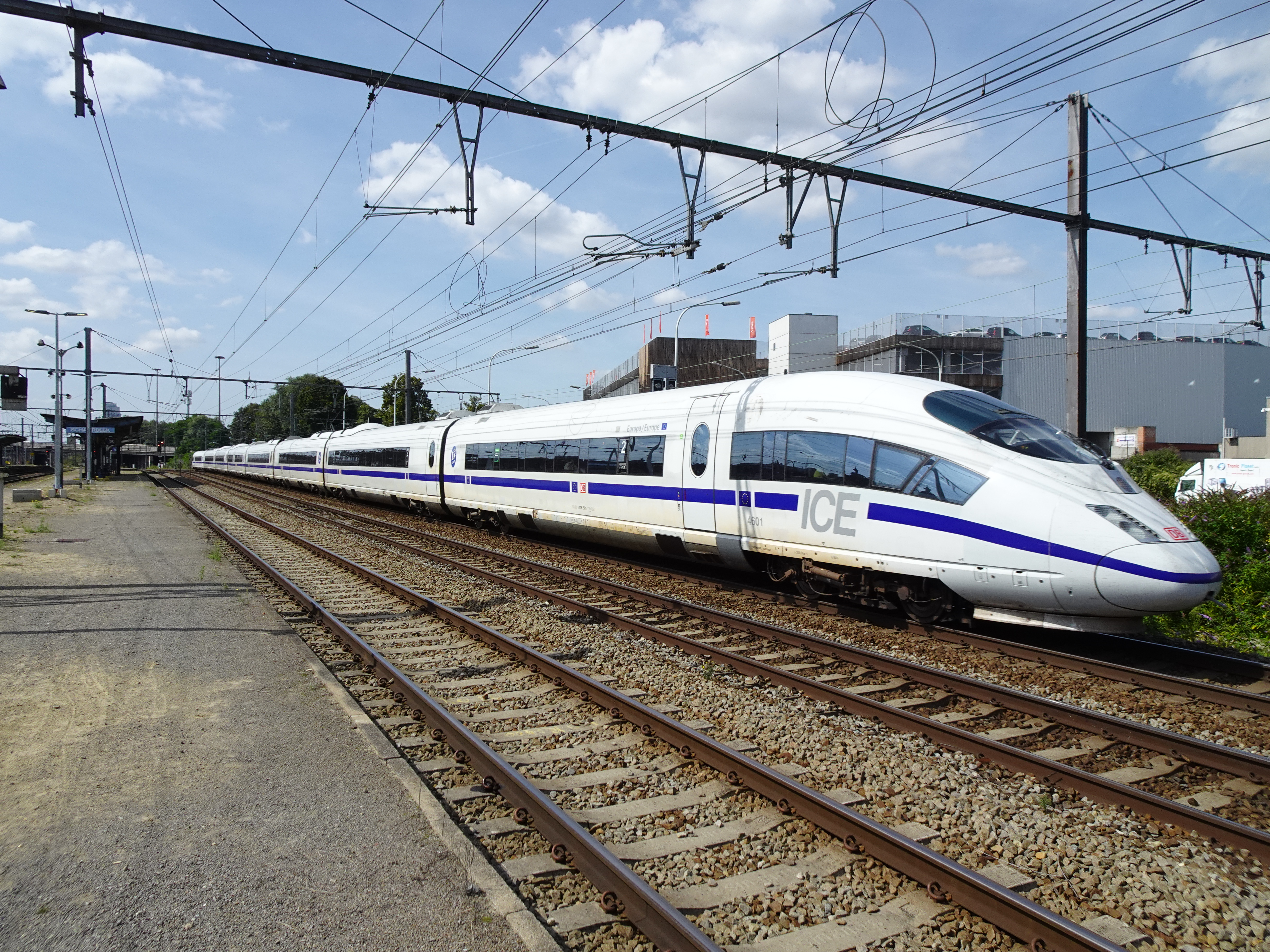 La rame 4601, en livrée spéciale bleue et blanche aux couleurs de l'Union européenne, traverse la gare de Schaerbeek via les voies rapides.